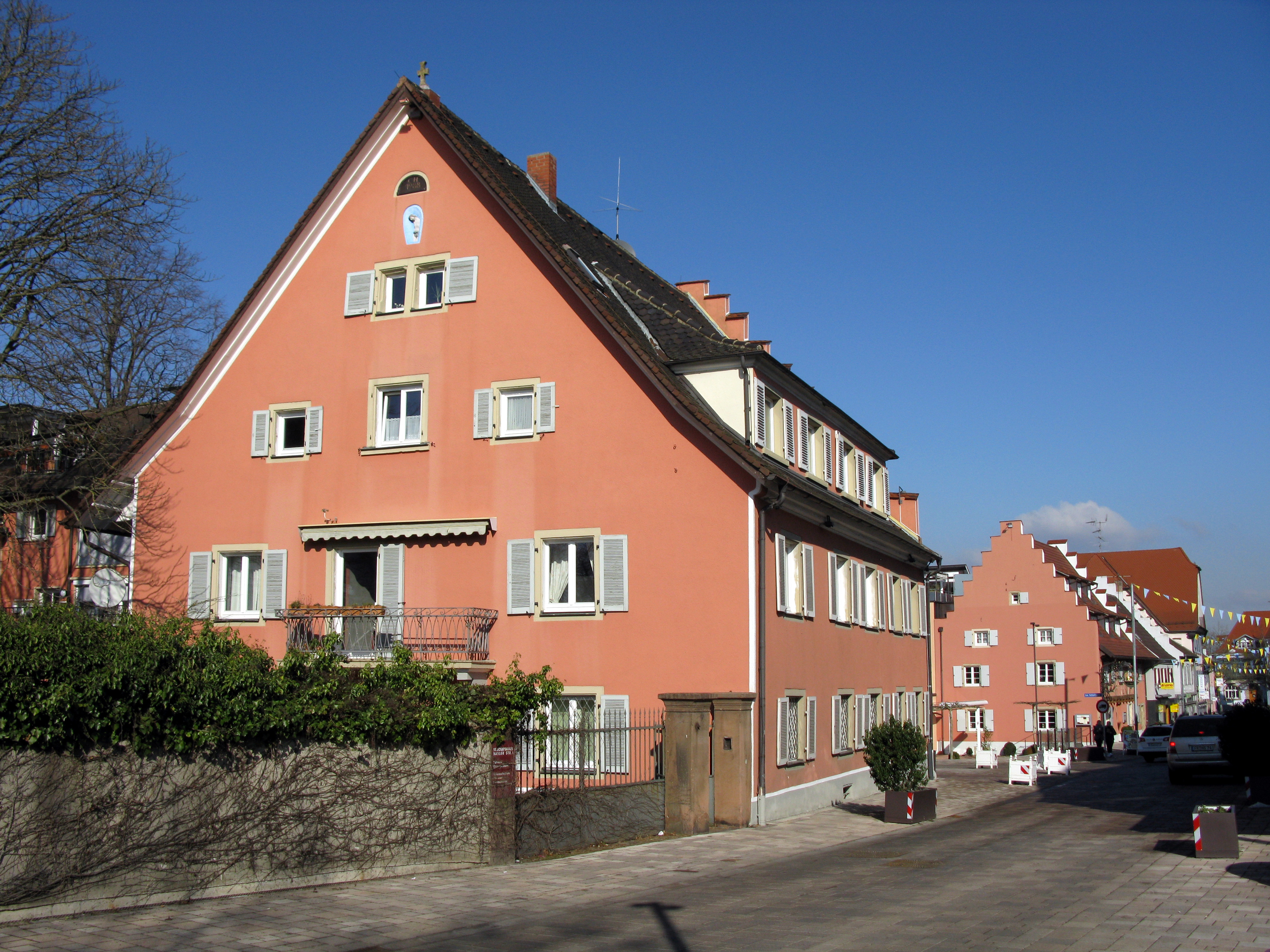 St. Josefshaus an der Basler Straße in Bad Krozingen